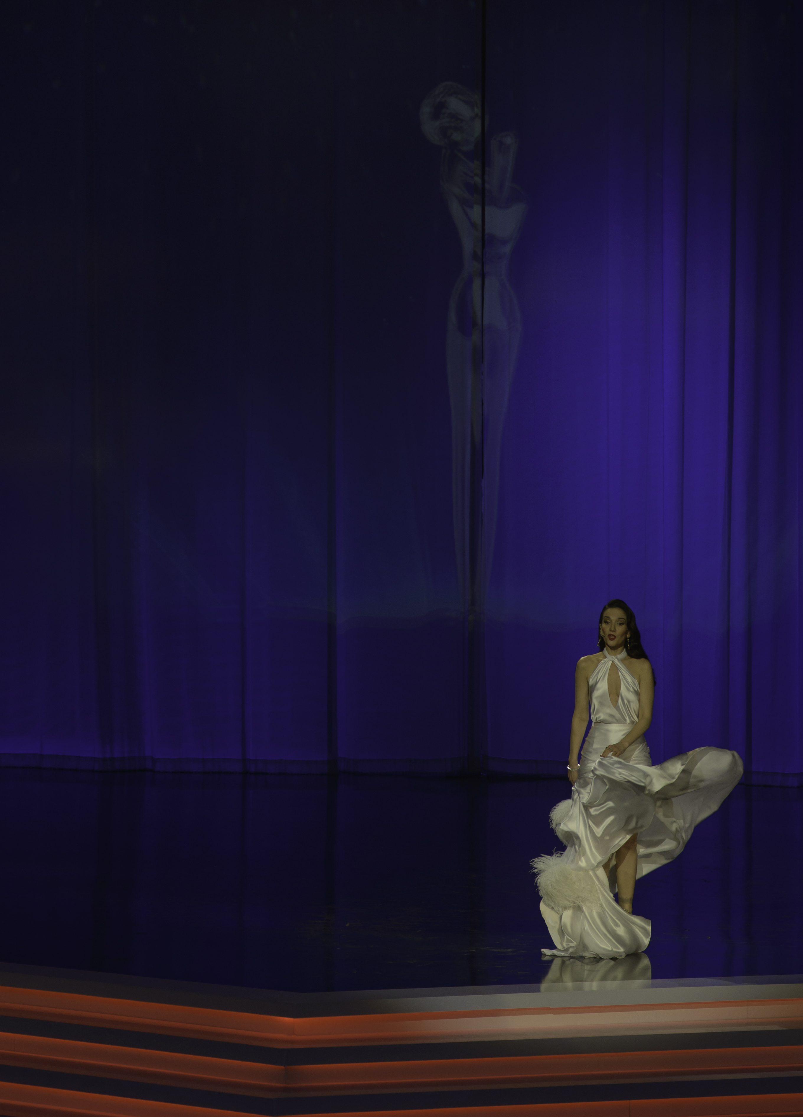 Convention Center, Punta del Este, Uruguay, 24 July 2016 5 5 ISO: 400